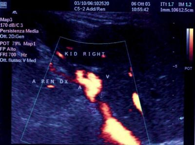 Böbrek arter stenozunun renkli Power Doppler sonografisi ile görüntüsü. kaynak: Agatino Manganaro , Giuseppe Ando' , Antonino Salvo , Andrea Consolo , Frank Coppolino and Domenico Giannino (2004) Cardiovascular Ultrasound 2:1 "A comparison of Power Doppler with conventional sonographic imaging for the evaluation of renal artery stenosis." [1] Figure 2 / Şekil 2.